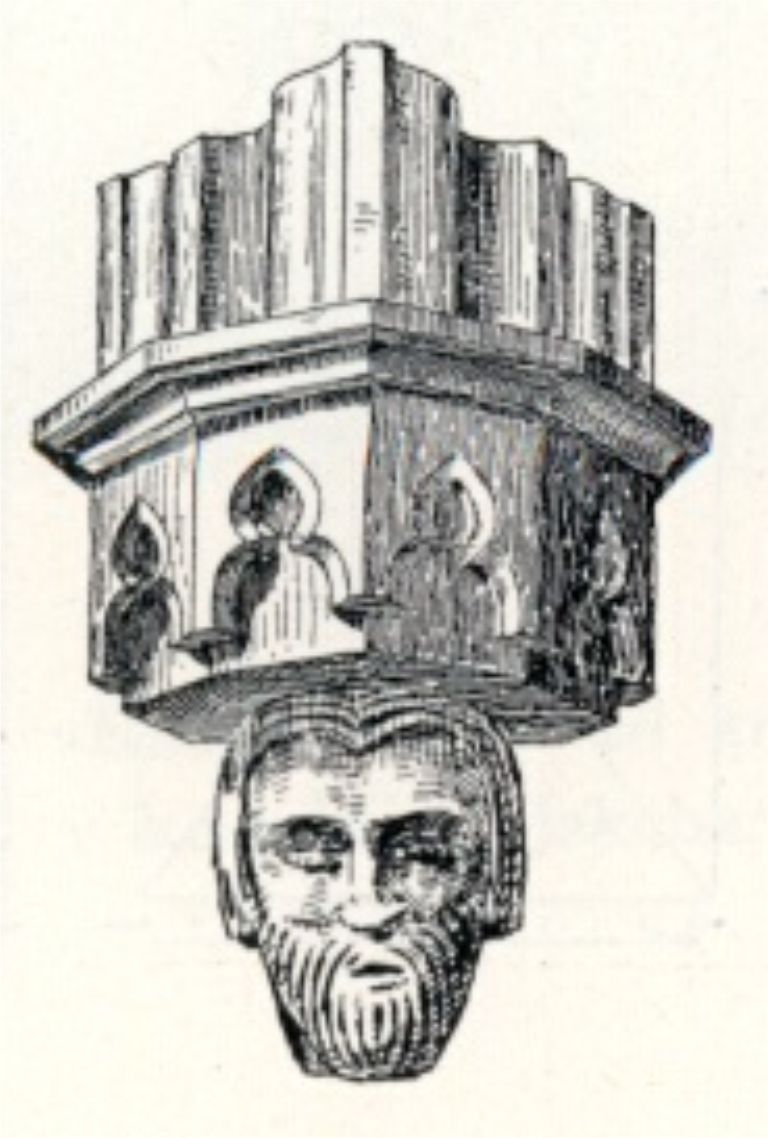 Detail konzoly v kostele sv. Jakuba v Libiši